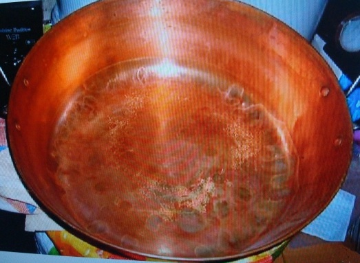 bassine cuivre pour cuire les confitures